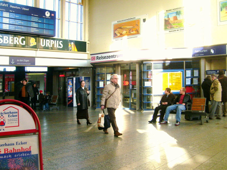 Bahnhofshalle in Homburg (Saar), Saarland, Deutschland.